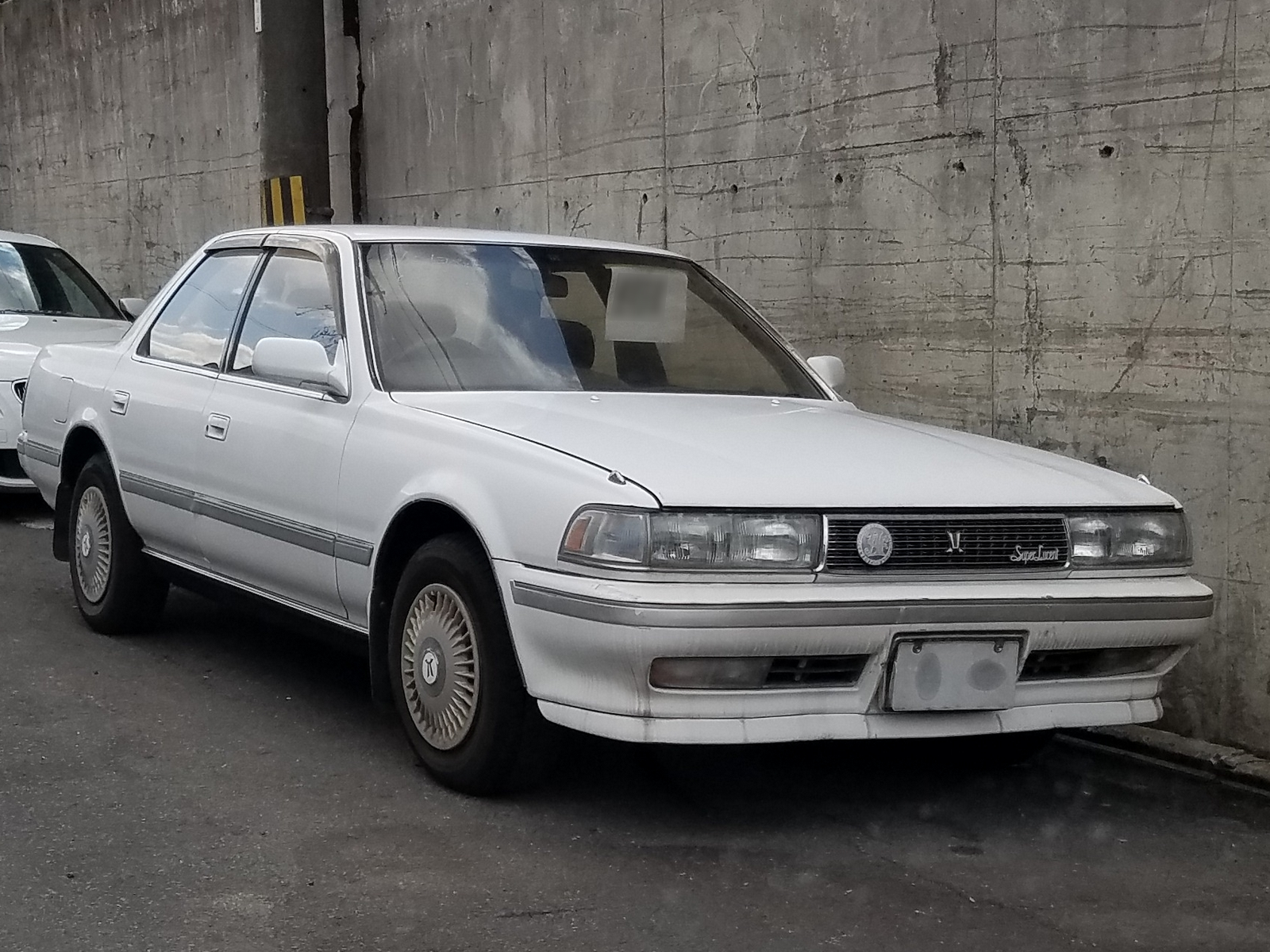 クレスタ スーパールーセントエクシード（前期型）